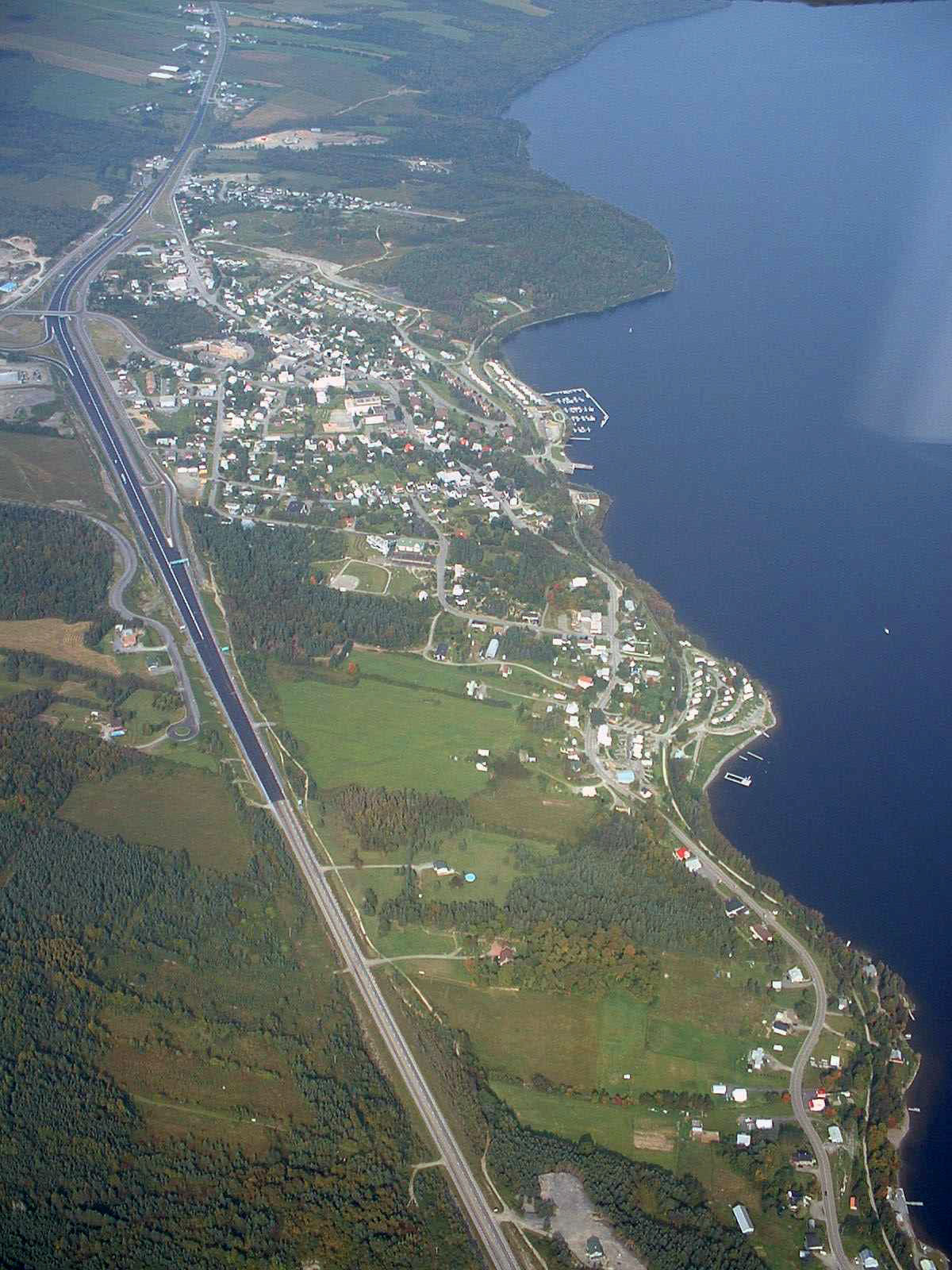 Vue aérienne de Notre-Dame-du-lac, Québec, Canada. Vue vers le nord avec, à droite le lac Témiscouata et, à gauche, la route trancanadienne. Auteur : Nicolas Gagnon